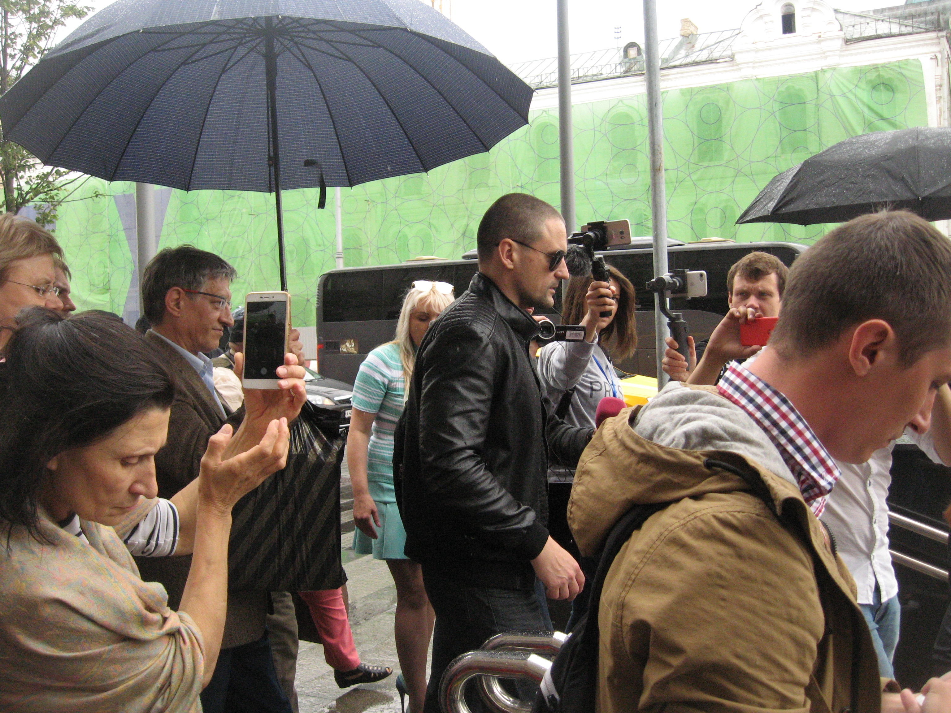 4 июля 2018 г противники увеличения пенсионного возраста подали петицию в администрацию президента РФ с требованием провести общероссийский референдум по этому вопросу. На фото - координатор "Левого Фронта" Сергей Удальцов после подачи петиции.